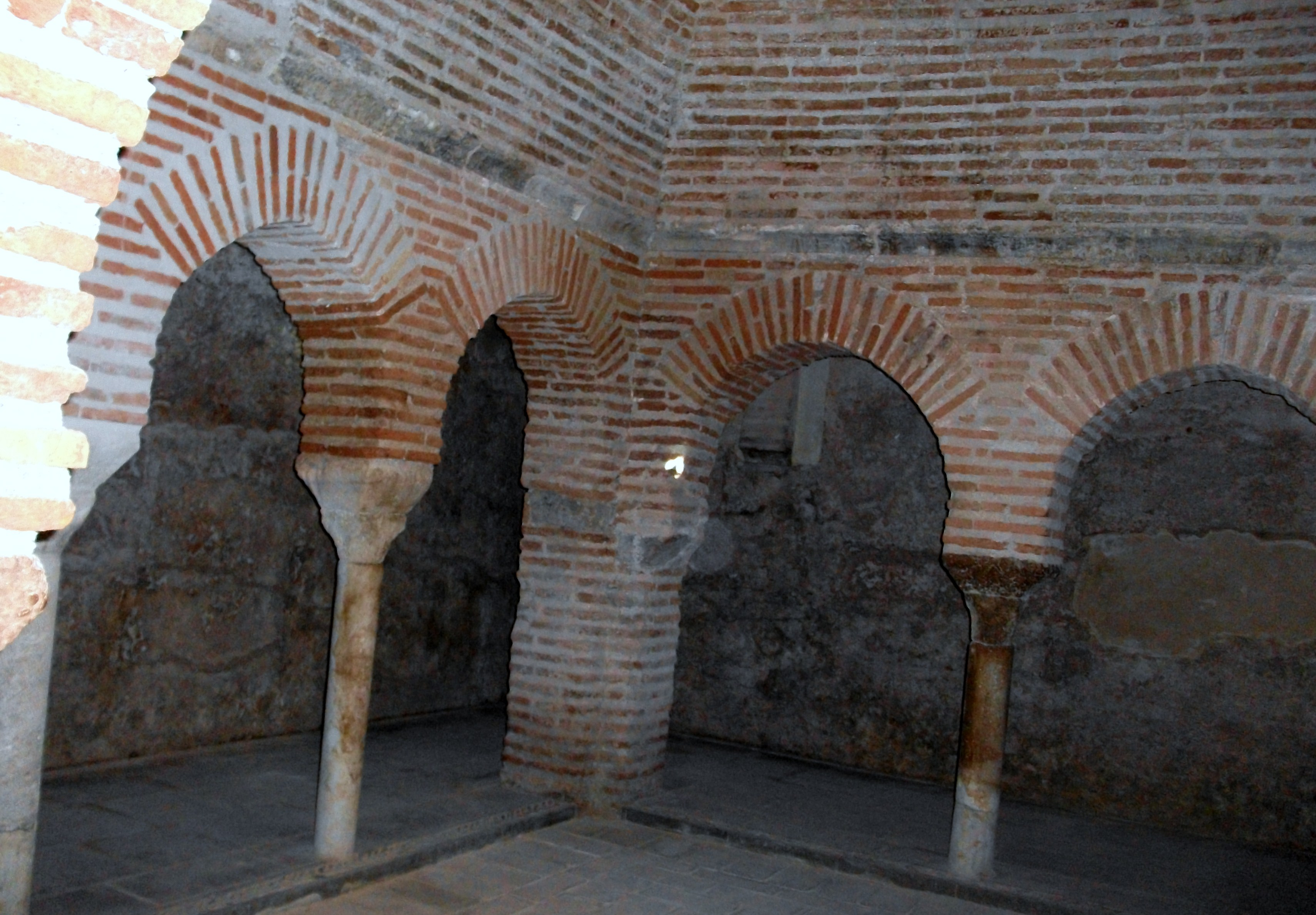 Baños Árabes de Baza